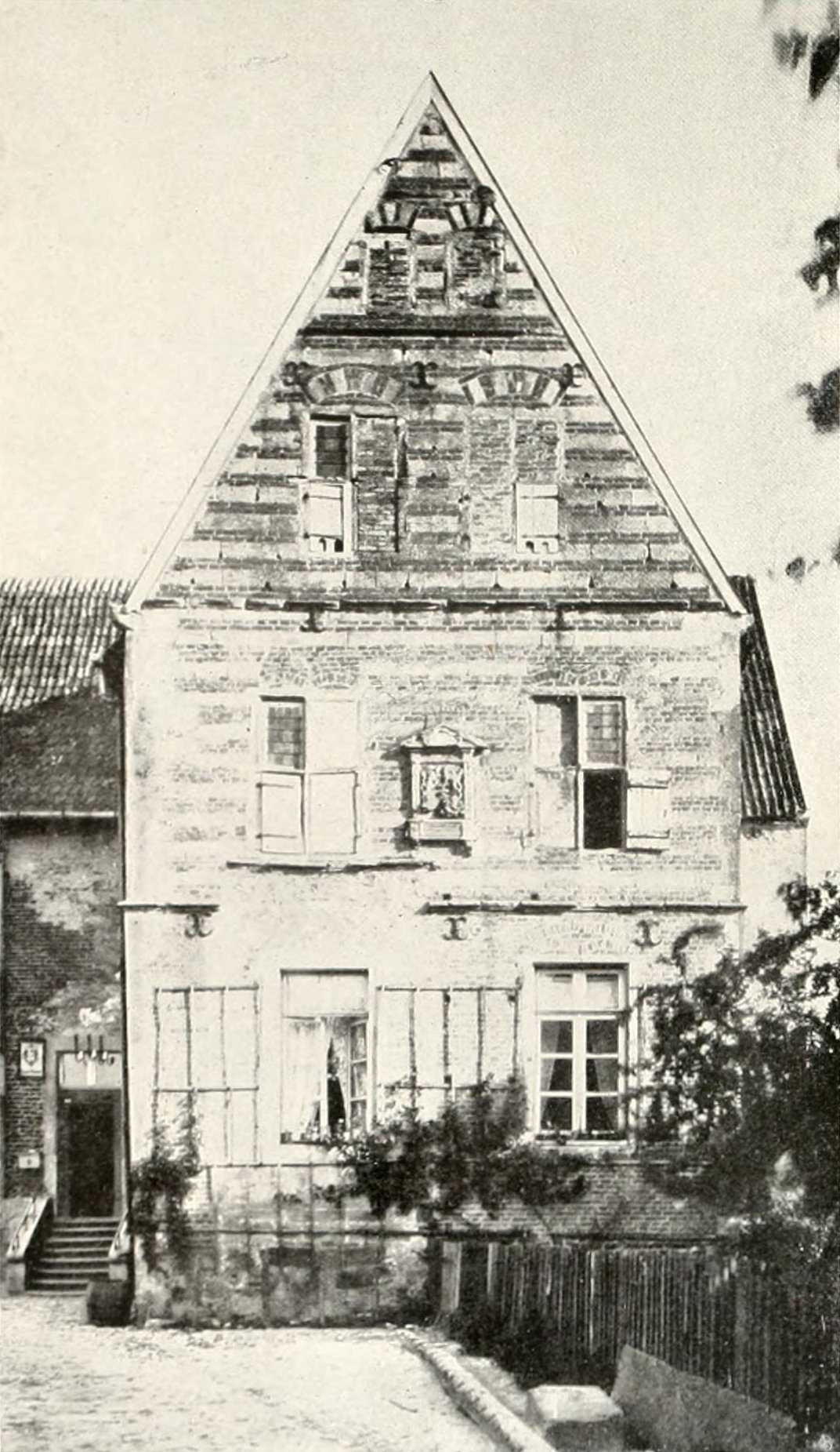 Merveldter Hof in Horstmar, Giebelfassade des Seitenflügels